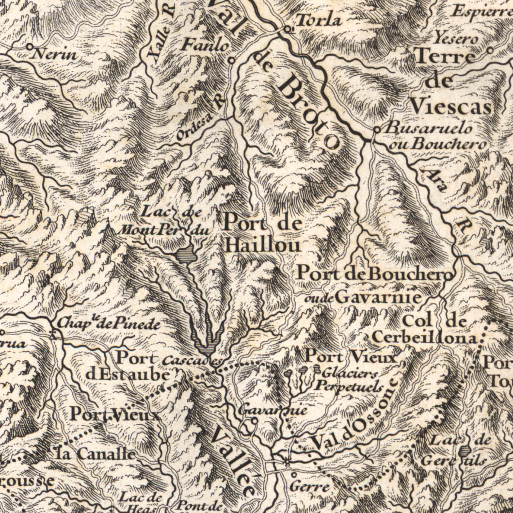 Extrait de la feuille 7 de la Carte de Roussel (1730) : la région du Mont-Perdu (France, Aquitaine, Cirque de Gavarnie). La carte de Roussel (1730) est une carte militaire. Le Sud est en haut de la carte, dans le sens où avancerait une armée française se dirigeant vers l'Espagne. La carte comprend huit feuilles et couvre toutes les Pyrénées, versants français et espagnol. Le Mont-Perdu ne figure pas sur la carte, mais un « lac du Mont-perdu » fantaiste d'où sortent des cascades.